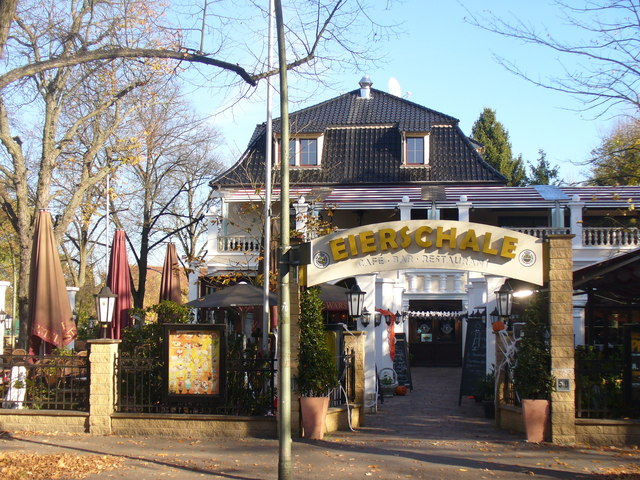 Berlin-Dahlem - Eierschale